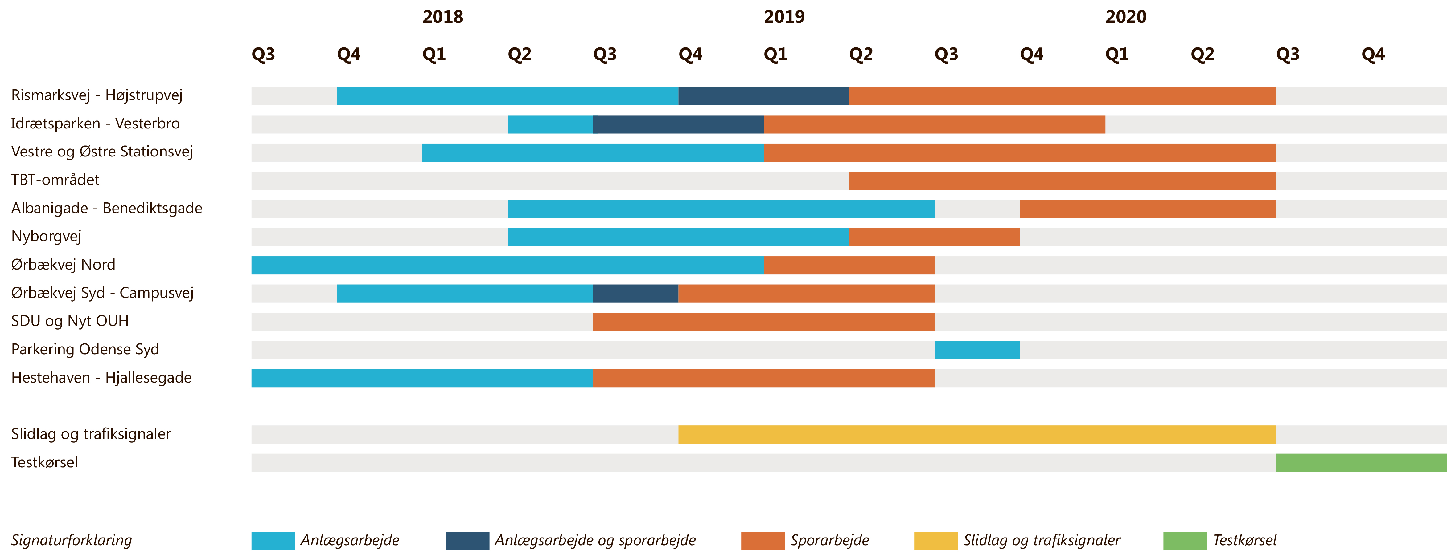 Simplificeret udgave af Odense Letbanes overordnede tidsplan. NB: Tiderne er foreløbige. Ændringer kan ske løbende.